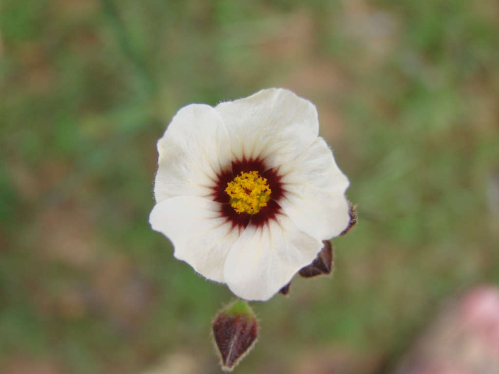 Sida linifolia - MALVACEAE Chapada Imperial - Brasília - Distrito Federal - Brasil.